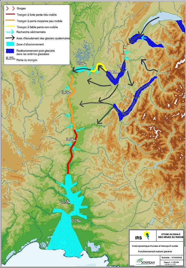 schéma du fonctionnement morphologique naturel du Rhône français